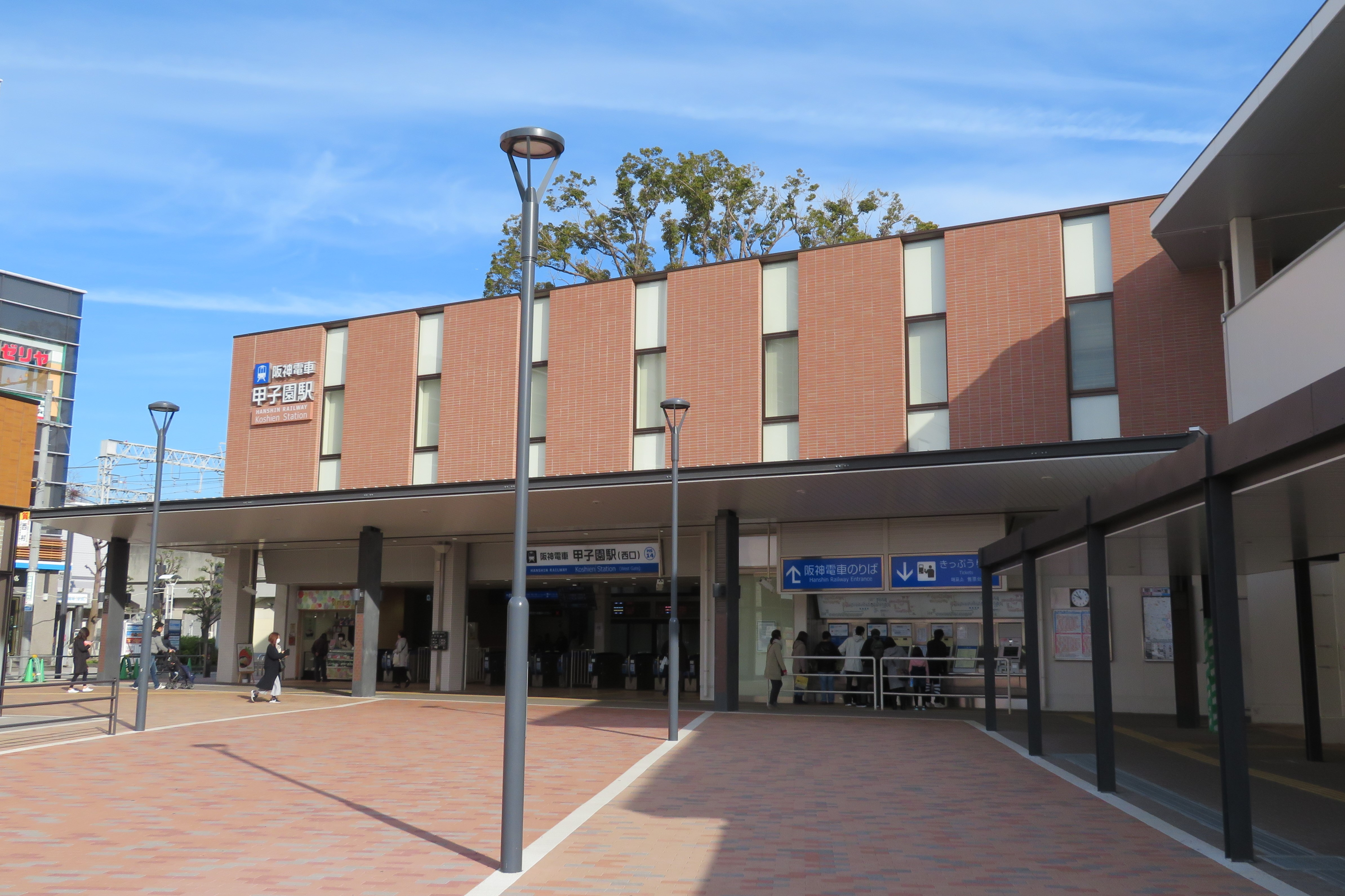 阪神甲子園駅西口